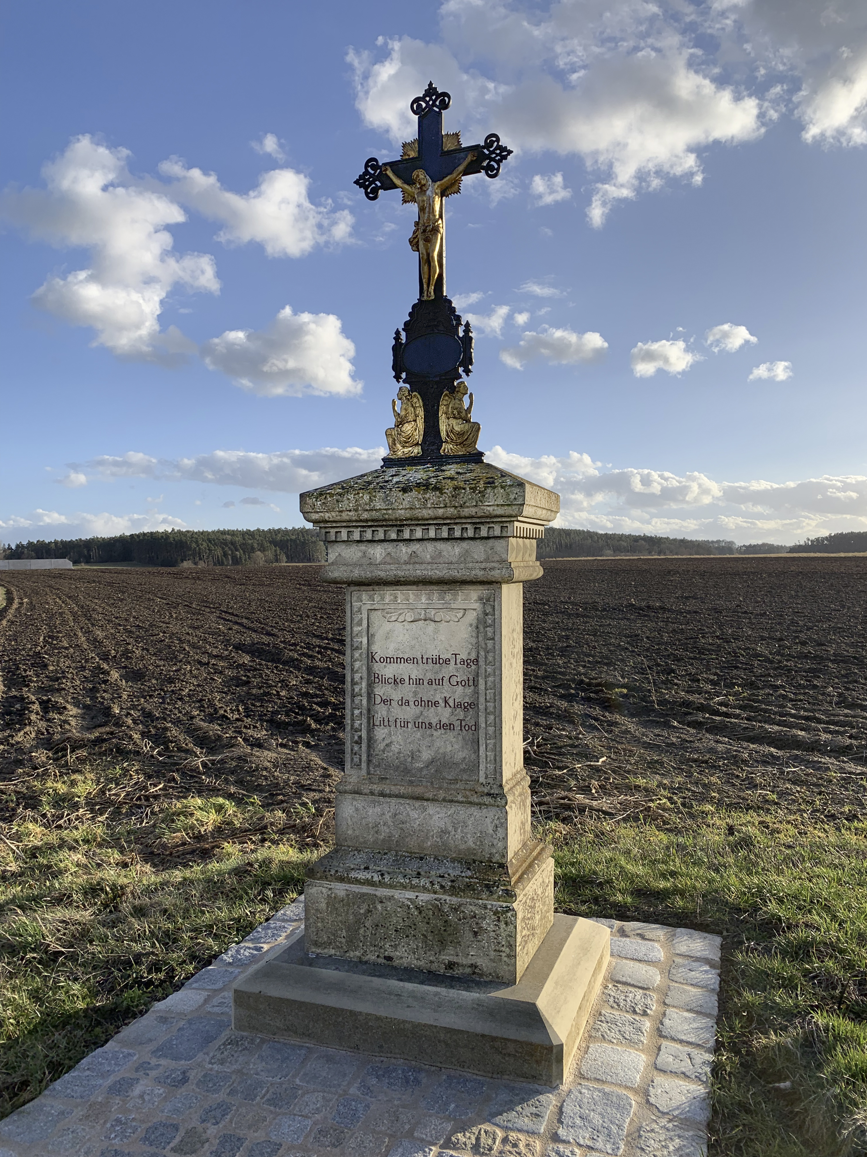 Wegkreuz bei Lammelbach, Gemeinde Herrieden, Hartfeld; zweite Hälfte des 19. Jahrhunderts. Bayerische Denkmalliste, Akten-Nr. D-5-71-166-92